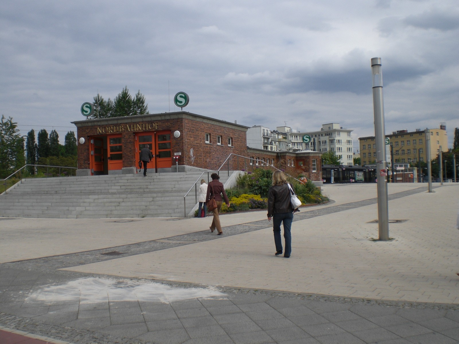 nördlicher Zugang des S-Bahnhofs Nordbahnhof in Berlin